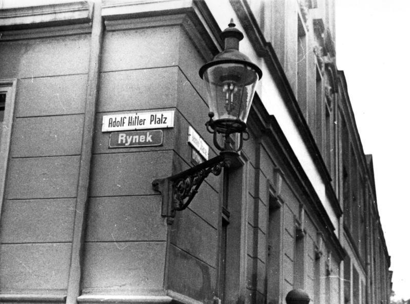 Polen, Anbringen deutscher Straßenschilder Aus der befreiten Provinz Posen. In allen Ortschaften werden die polnischen Strassenbezeichnungen durch deutsche ersetzt. U.B.z. ein Strassenschild mit der Aufschrift "Adolf Hitler-Platz" in Jarotschin. Darunter die alte polnische Bezeichnung. Fot. Ho. 22.10.39